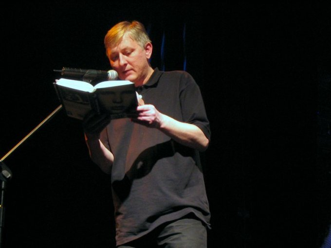 Andrzej Sosnowski, Polish poet and translator